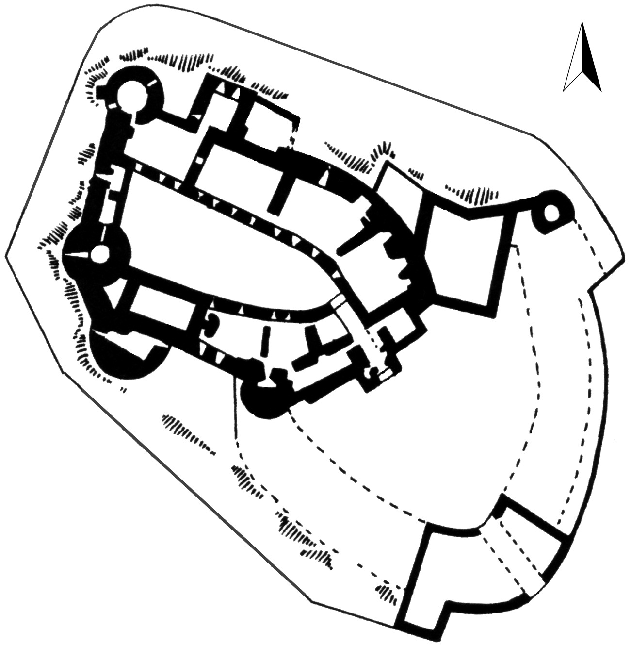 Grundriss des luxemburgischen Schlosses Clerf